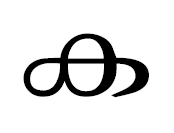 какарам